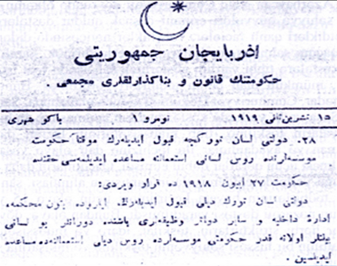 1919 yılında Azerbaycan'da devletin resmi dilinin Türkçe olduğunun ilan edilmesi: Devletî lisân Türkçe kabûl edilerek ...